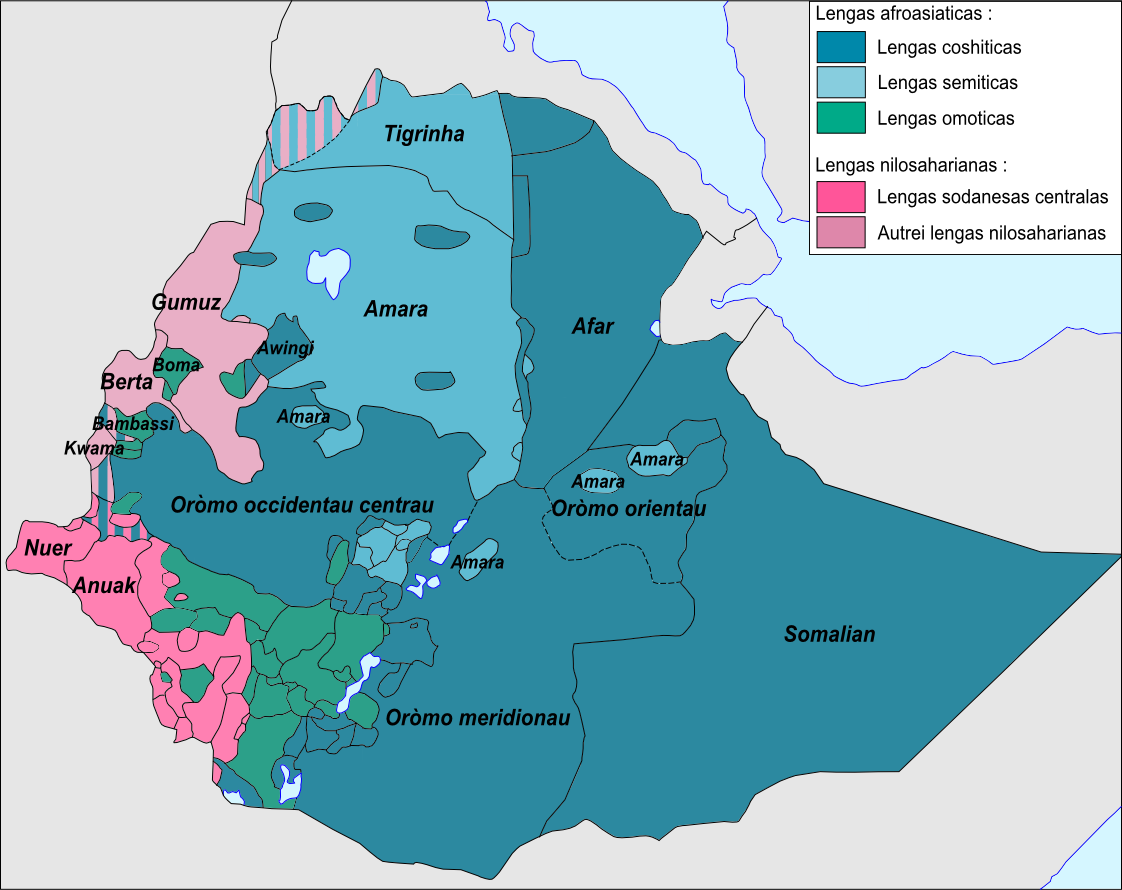 Esquèma generau dei lengas etiopianas.